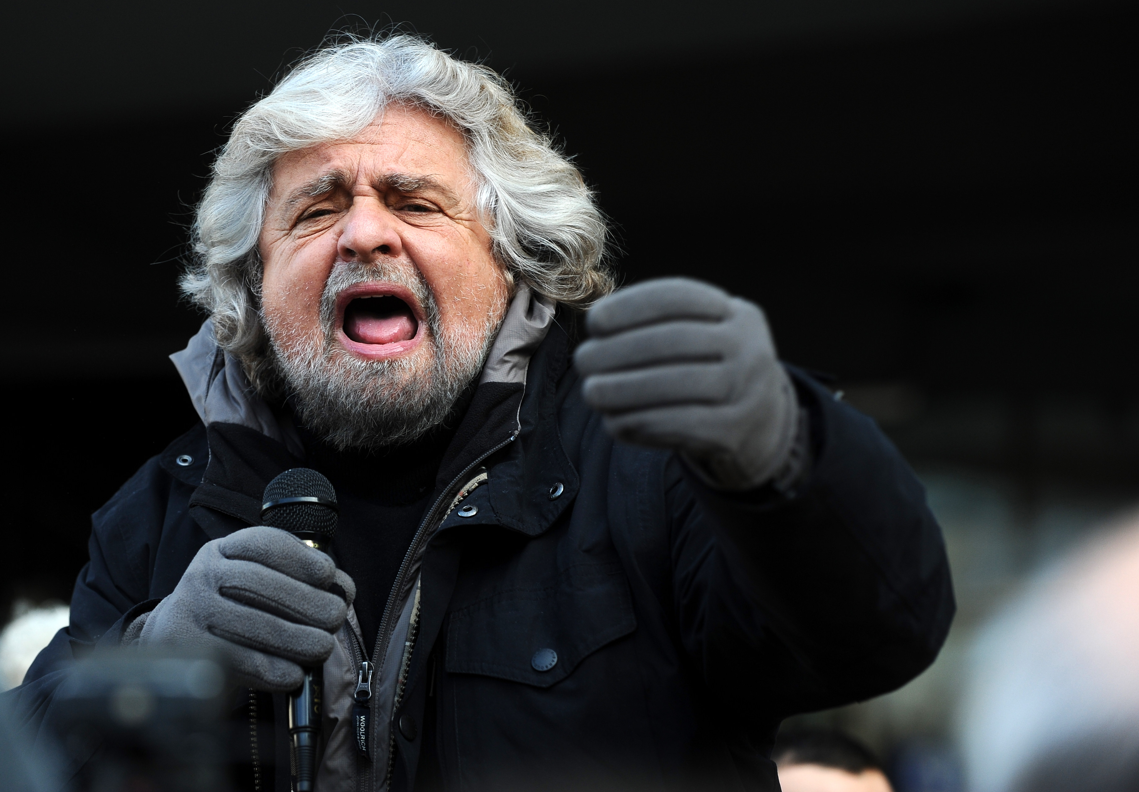 Beppe Grillo al banchetto del Movimento 5 Stelle in Piazza Dante a Trento per la raccolta di firme per la presentazione delle liste alle elezioni politiche del 2013.